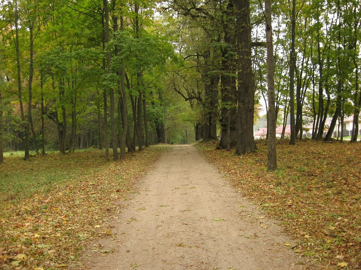 Уселюб. Уселюбскі парк. Усходняя алея ў рэгулярнай частцы парку